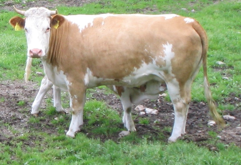 Hausrindkuh säugt ihr Kalb (Hinterwälderrasse aus Zuchtverband)